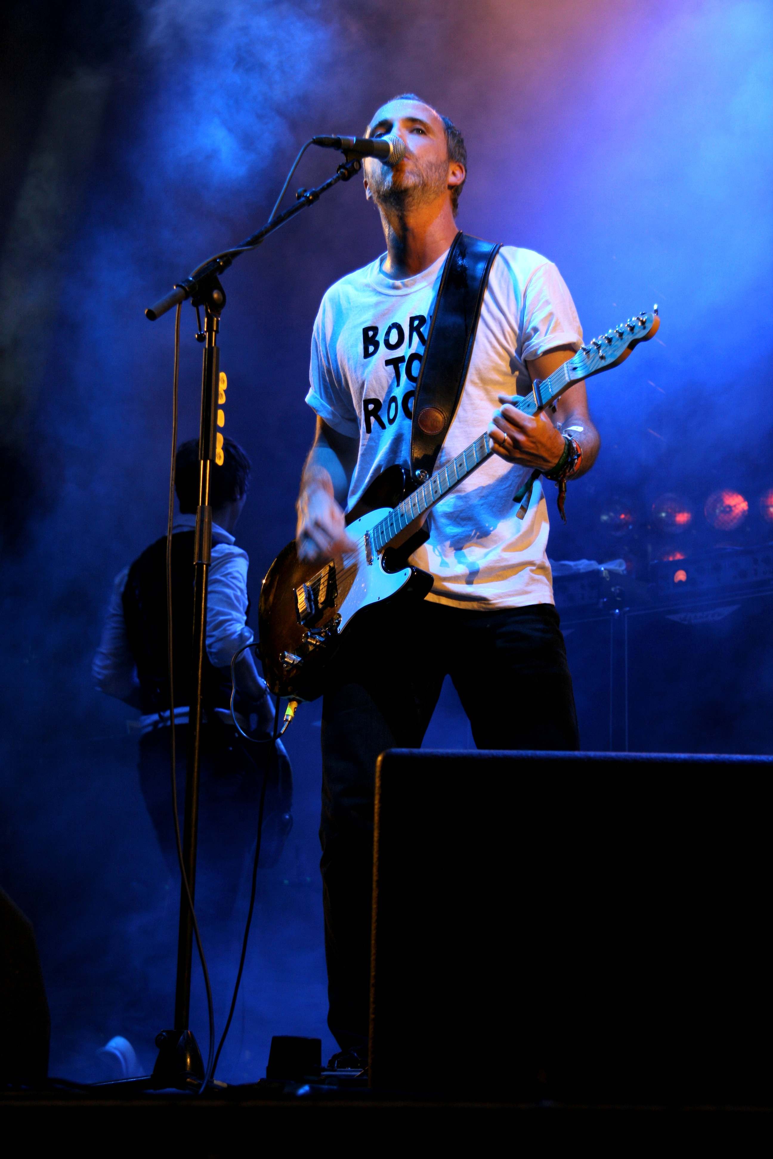 Francis Healy /Travis en la antigua Fábrica Damm de Barcelona